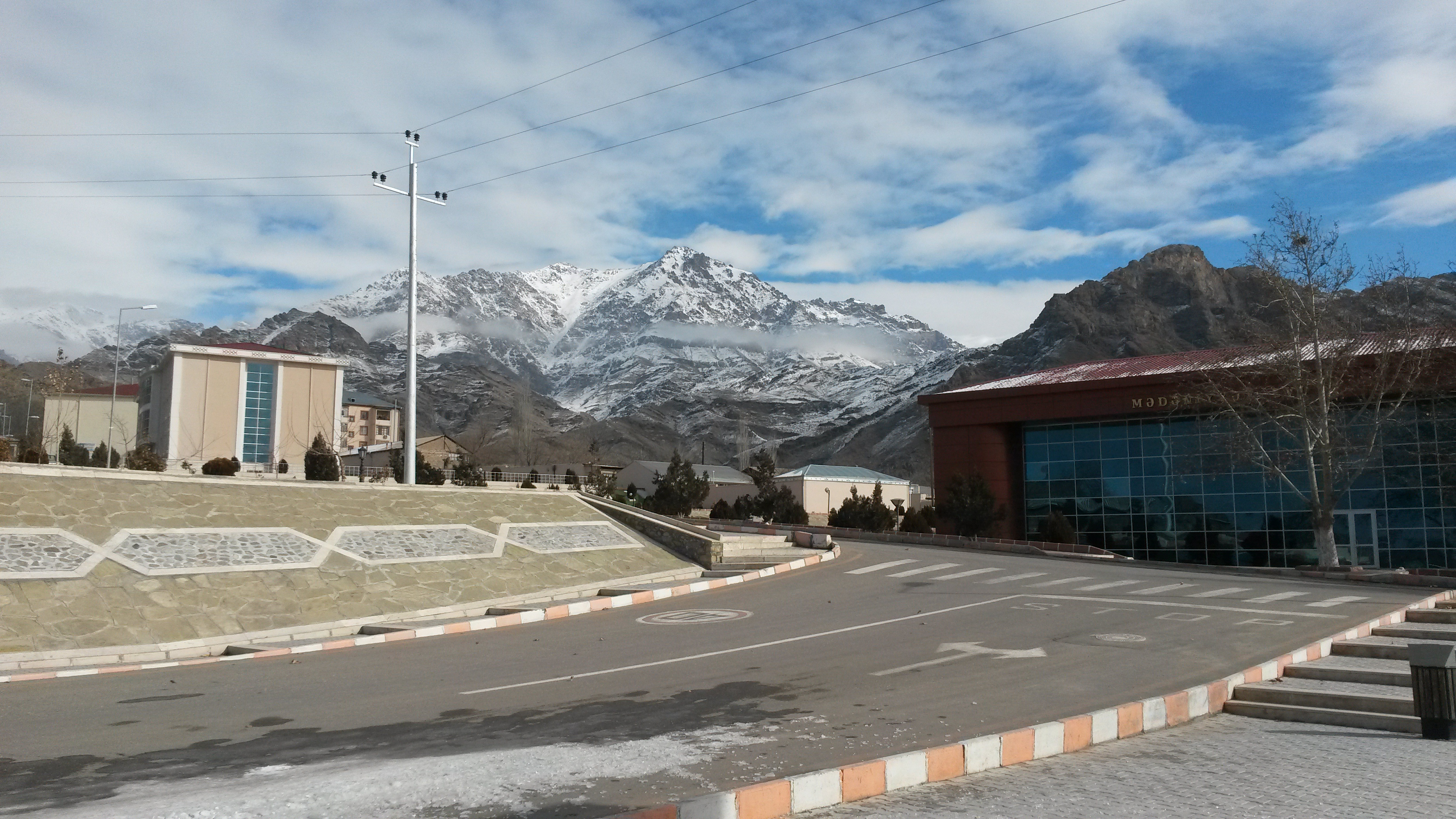 Ordubad